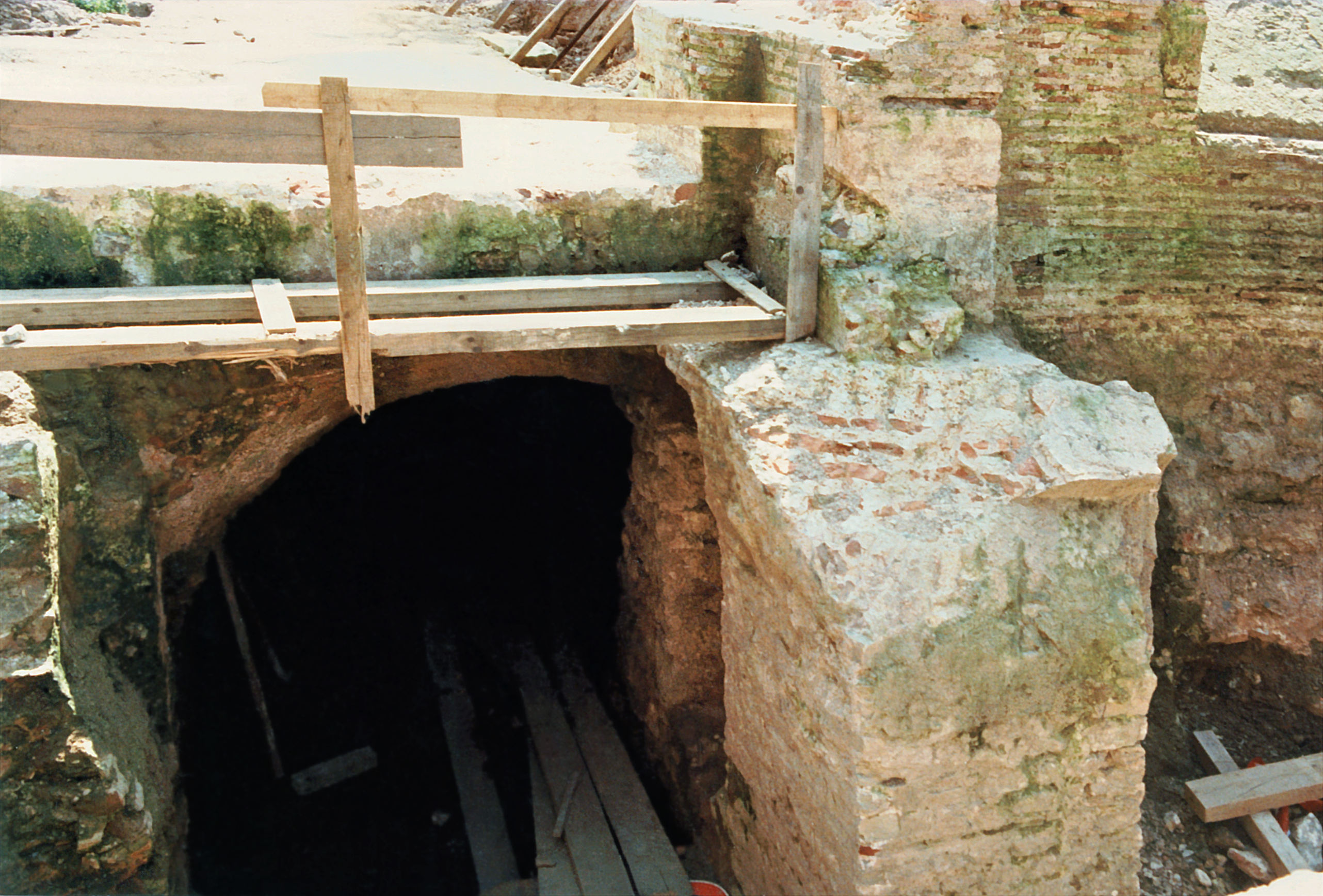 Trier, konstantinische Palastaula: Grabung im Bereich des westlichen Flügels der Vorhalle. Rechts im Bild ist noch die halbrunde Apsis zu erkennen. Blick in den südwestlich verlaufenden Wandelgang.